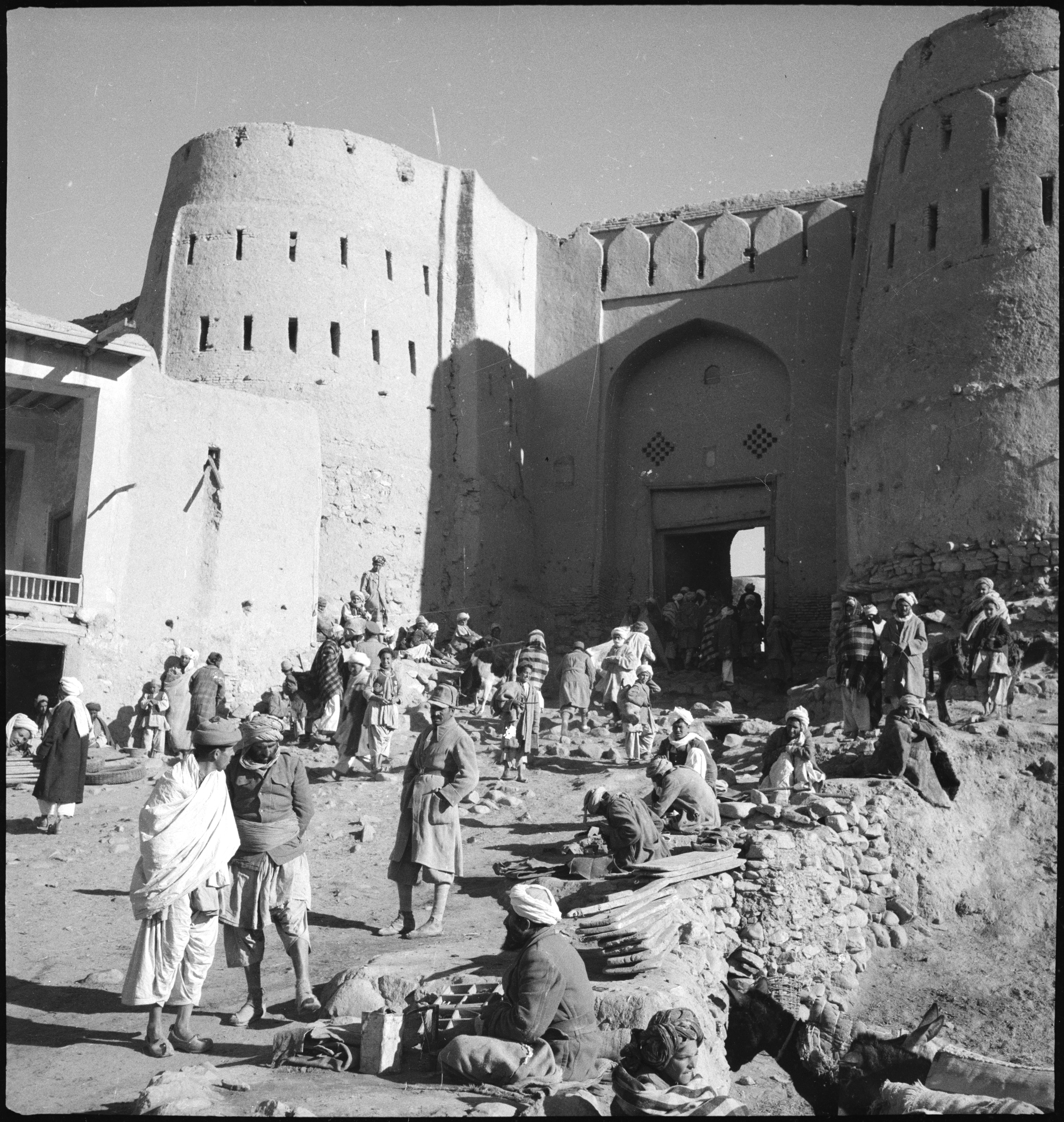 Afghanistan, Ghazni (Ghazna): Stadtansicht; Menschen vor dem Stadttor